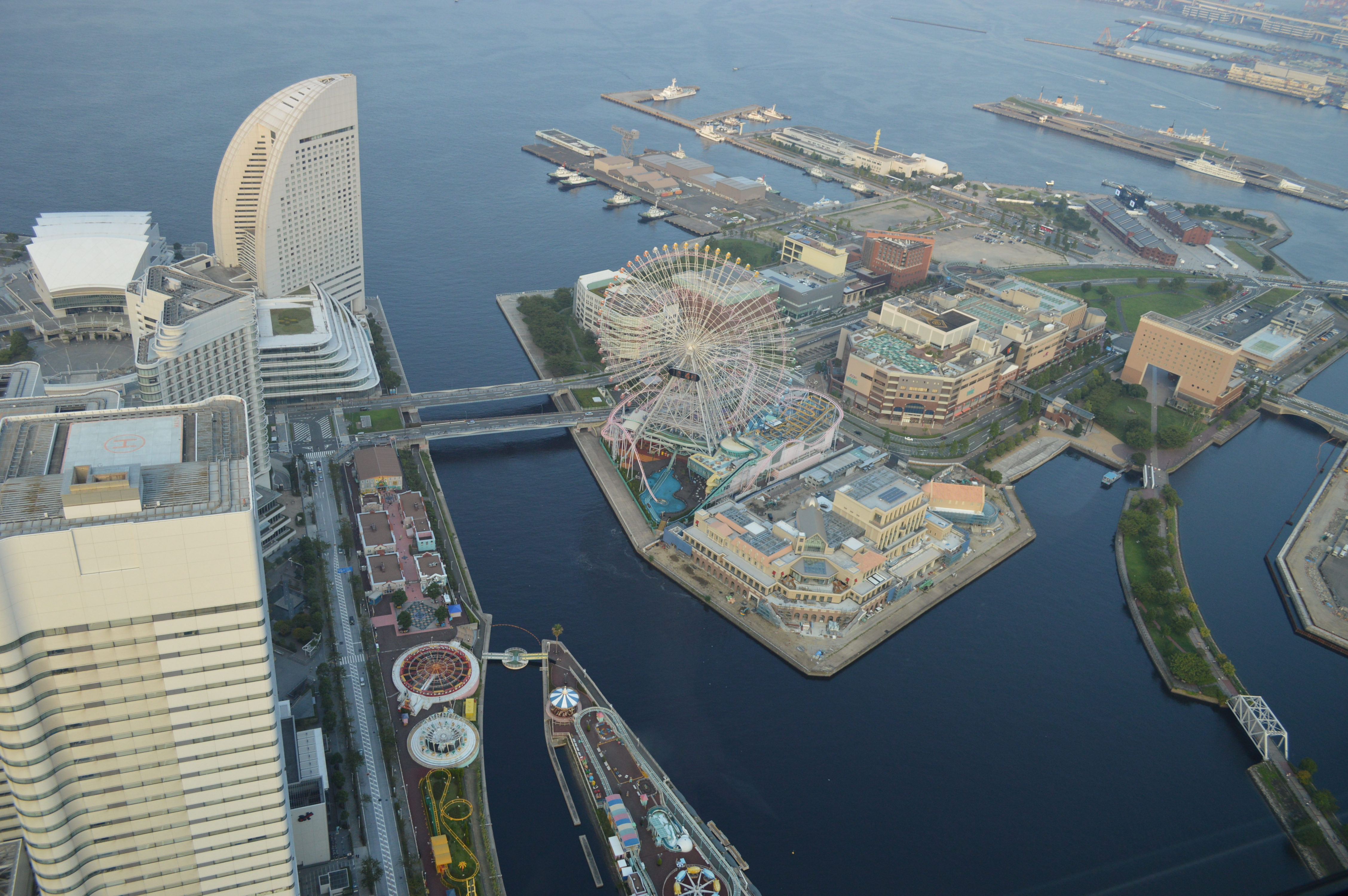 横浜ランドマークタワーのスカイガーデンから見下ろす横浜コスモワールド